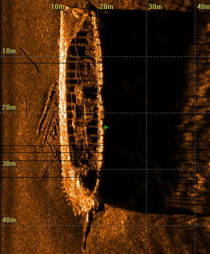 Laevavrakk "Aid". Külgvaatesonari pilt vrakist.